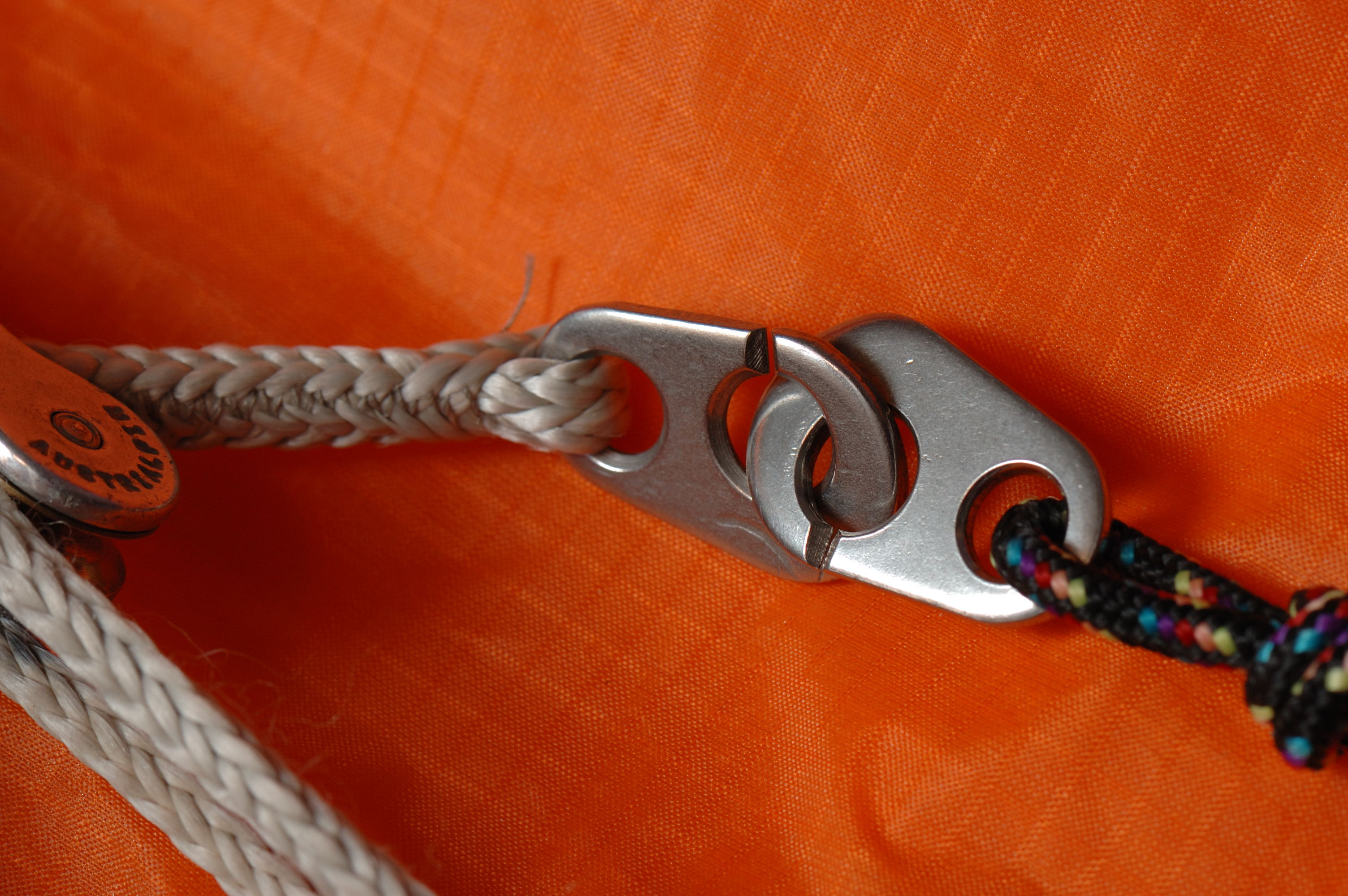 Brummelhaken verbinden zwei Leinen --Texaskäs 14:20, 5. Feb. 2011 (CET)